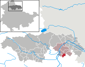 Hemleben in Thuringia - Kyffhäuserkreis